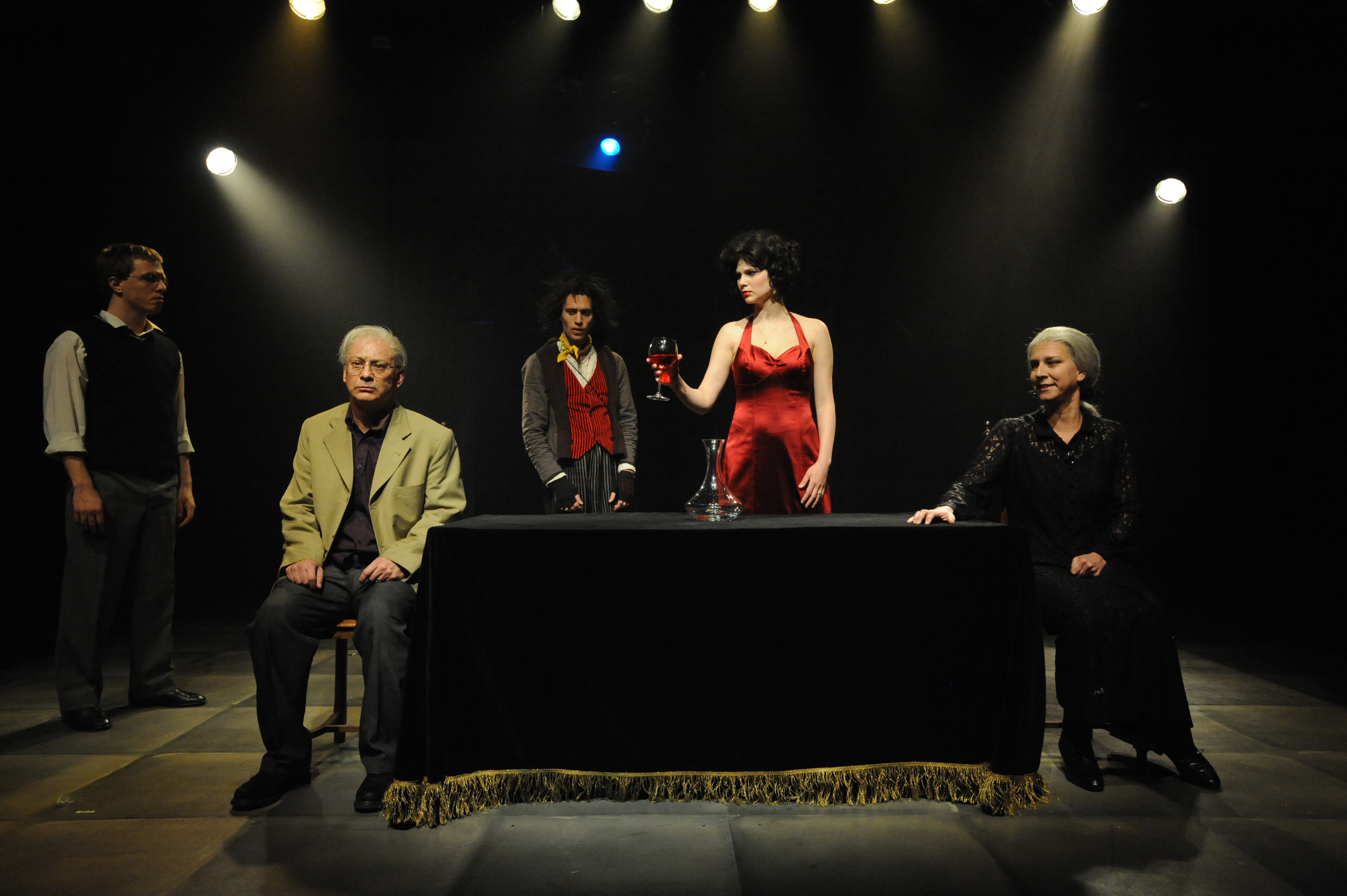 עירית פשטן, שמרית לוסטיג, ויטלי פרידלנד, ארז שפריר ואודי רוטשילד בהצגה "אהובת הדרקון", מאת ובבימויו של מיקי גורביץ', תיאטרון החאן